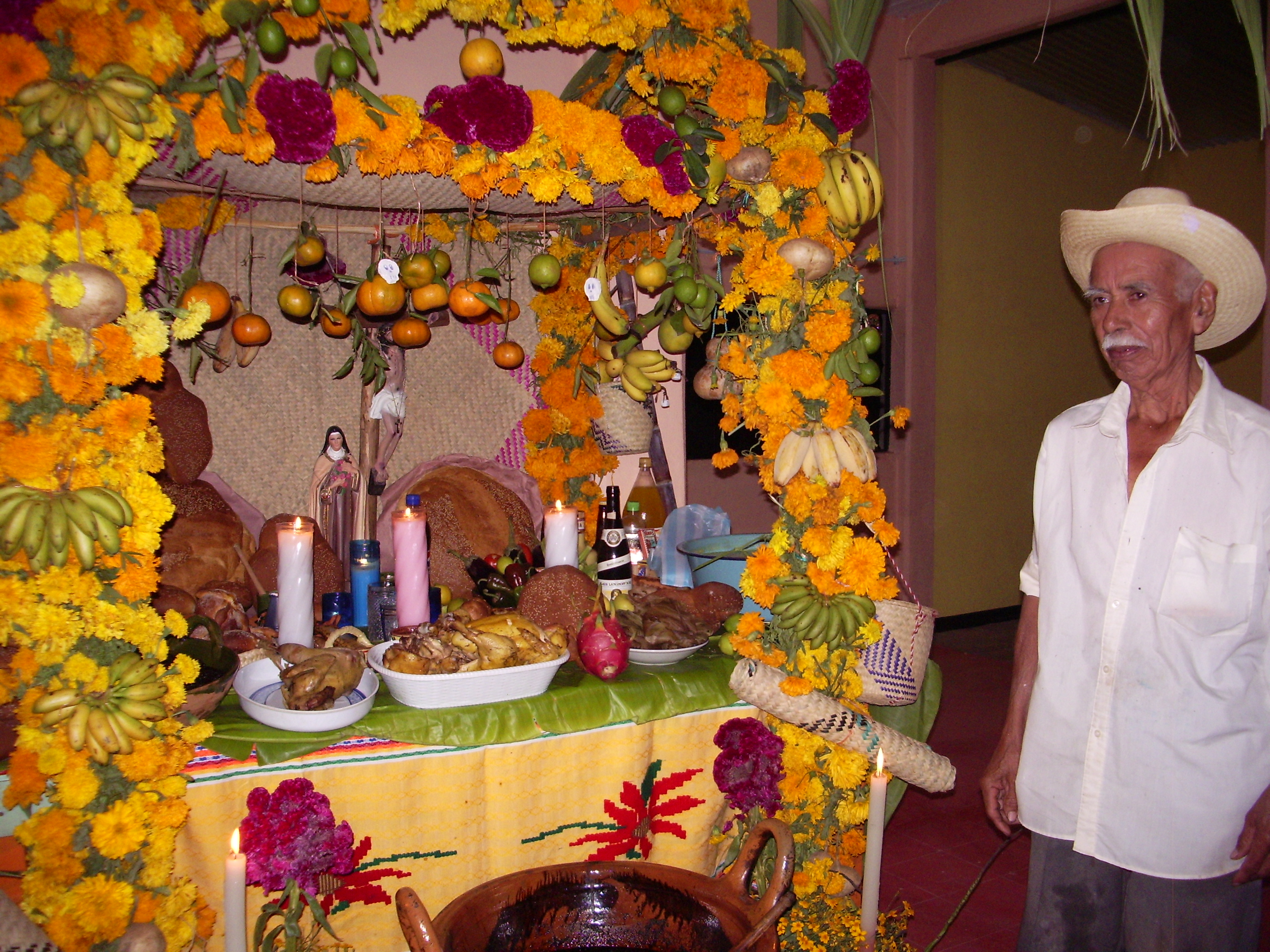 Poblador de Cuicatlán, Oaxaca, posando junto a su altar de Muertos.